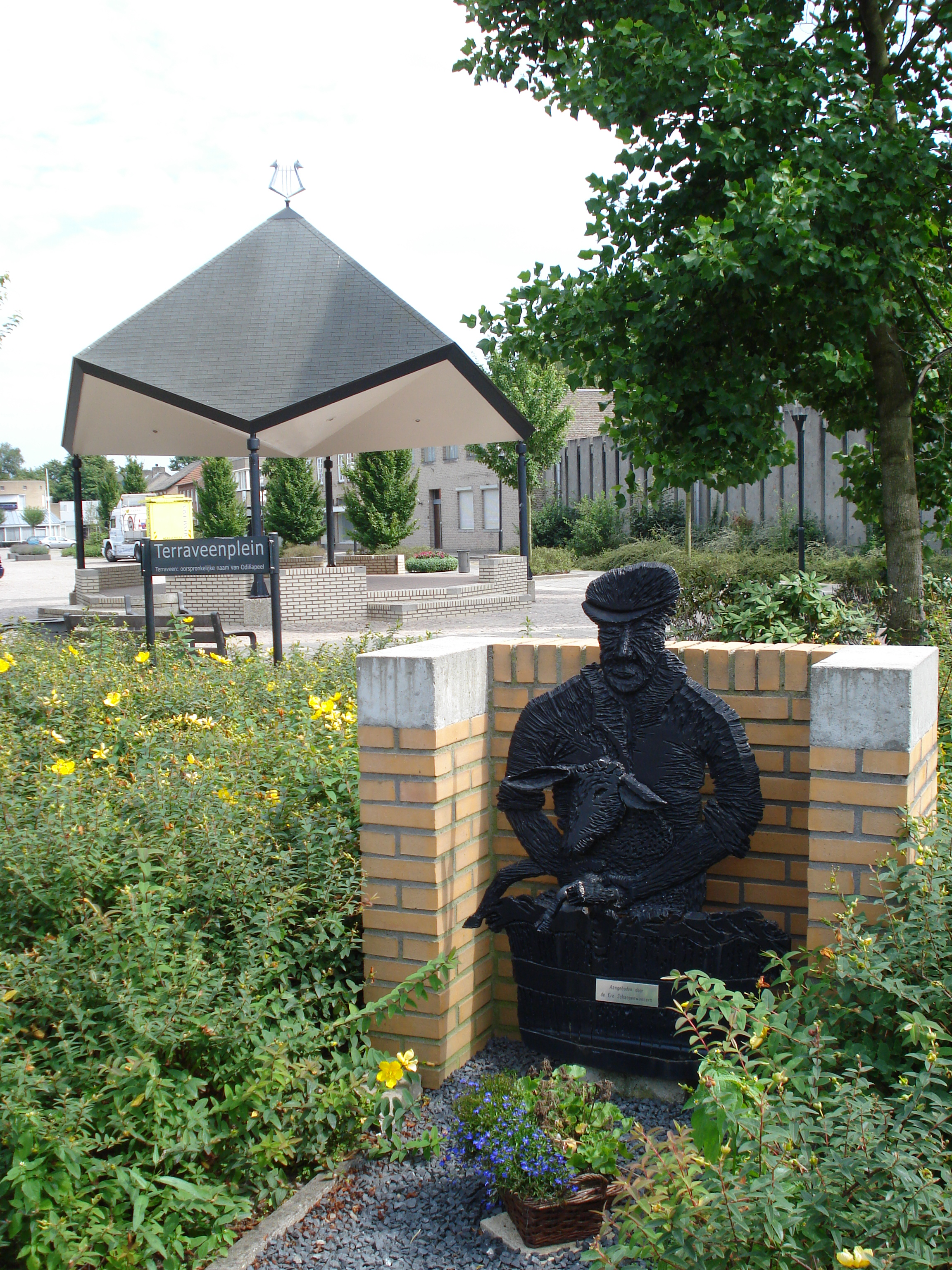 Odiliapeel, Terraveenplein, place Terraveen commémorant le premier nom du village, avec sculpture: tondeur de moutons.